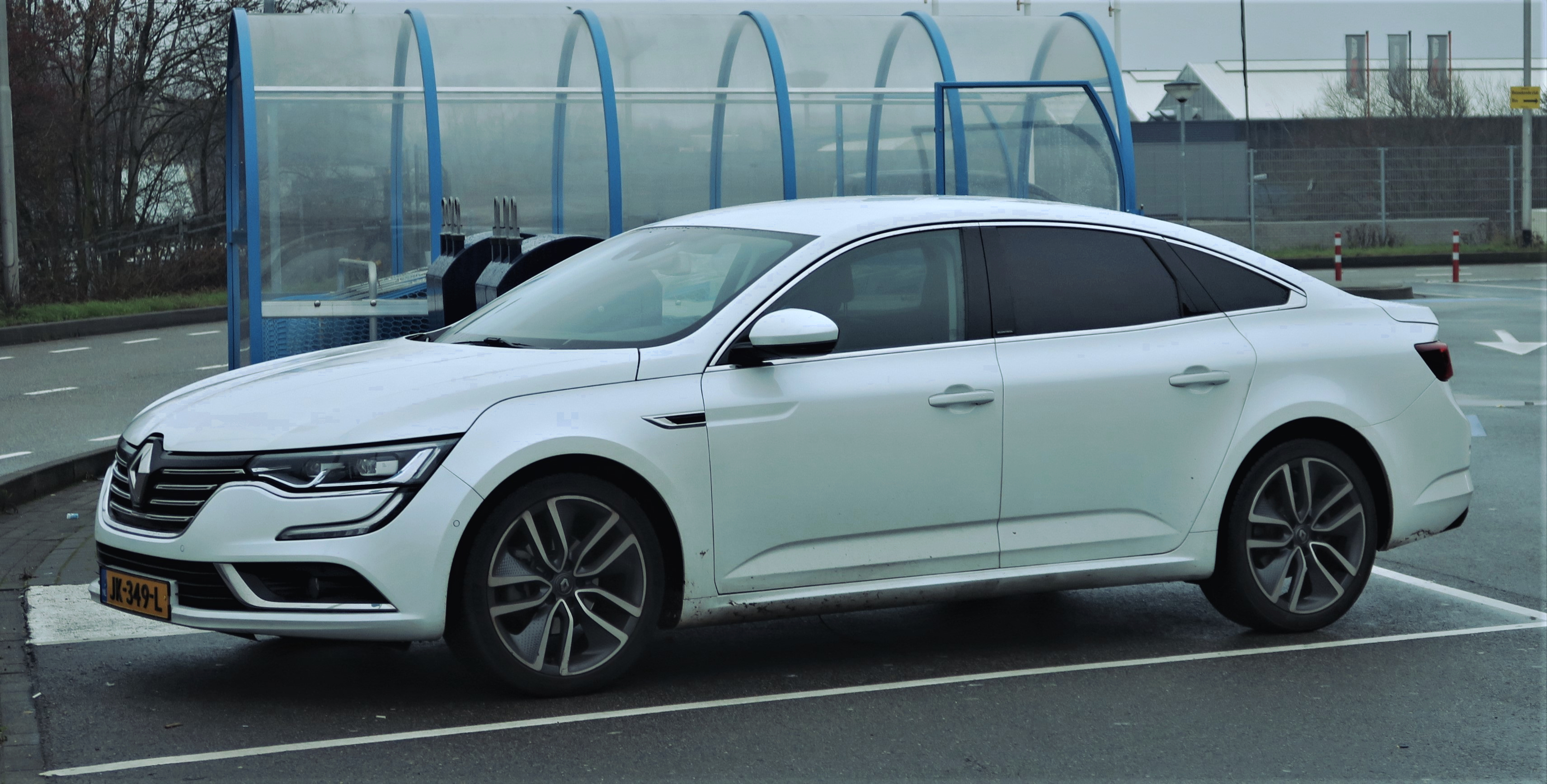 Renault Talisman dans zone commercial Kerkrade, Pays Bas